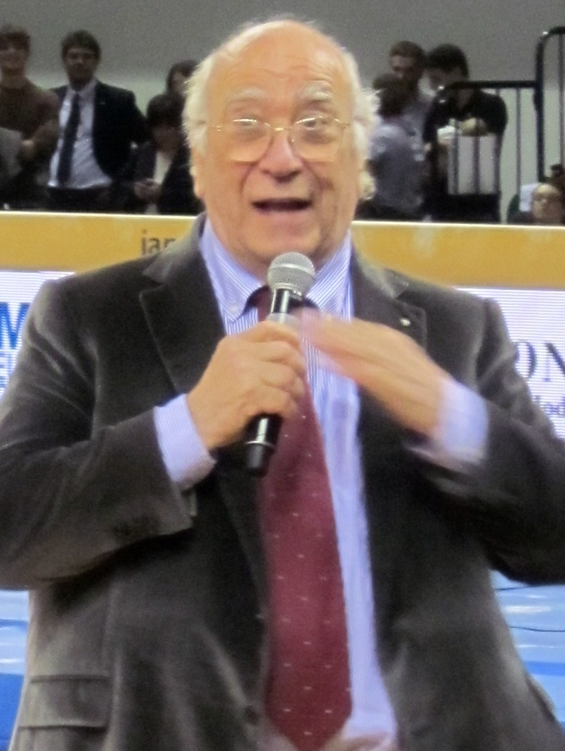 Depicted person: Giovanni Rana al Grand Prix di Ginnastica 2013